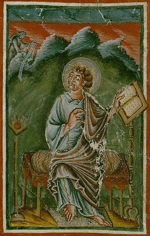 Evangeliar des Hinkmar von Reims, BM Reims, Ms. 7, Bl. 21v